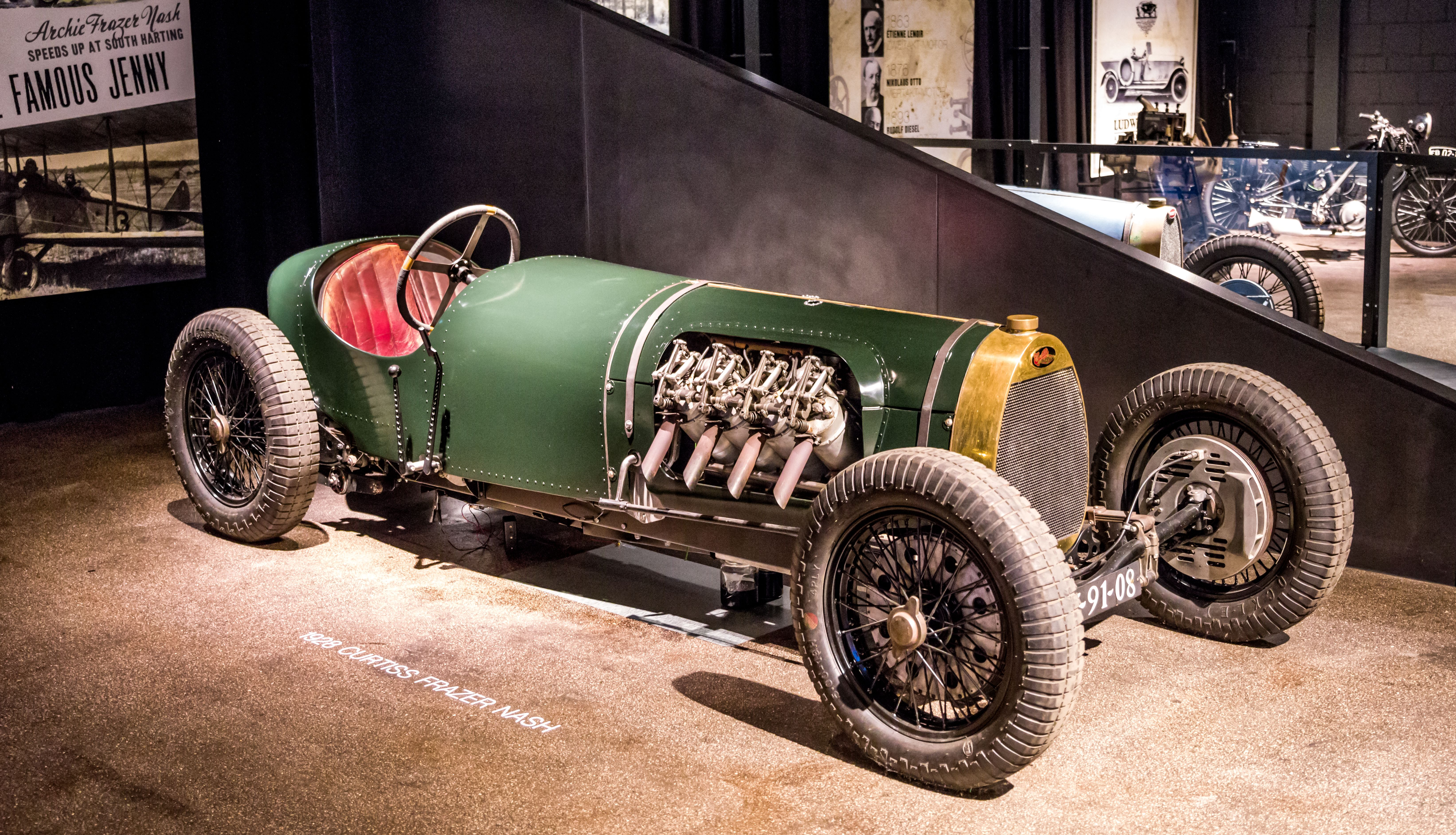 Das Volante Oldtimermuseum in Kirchzarten